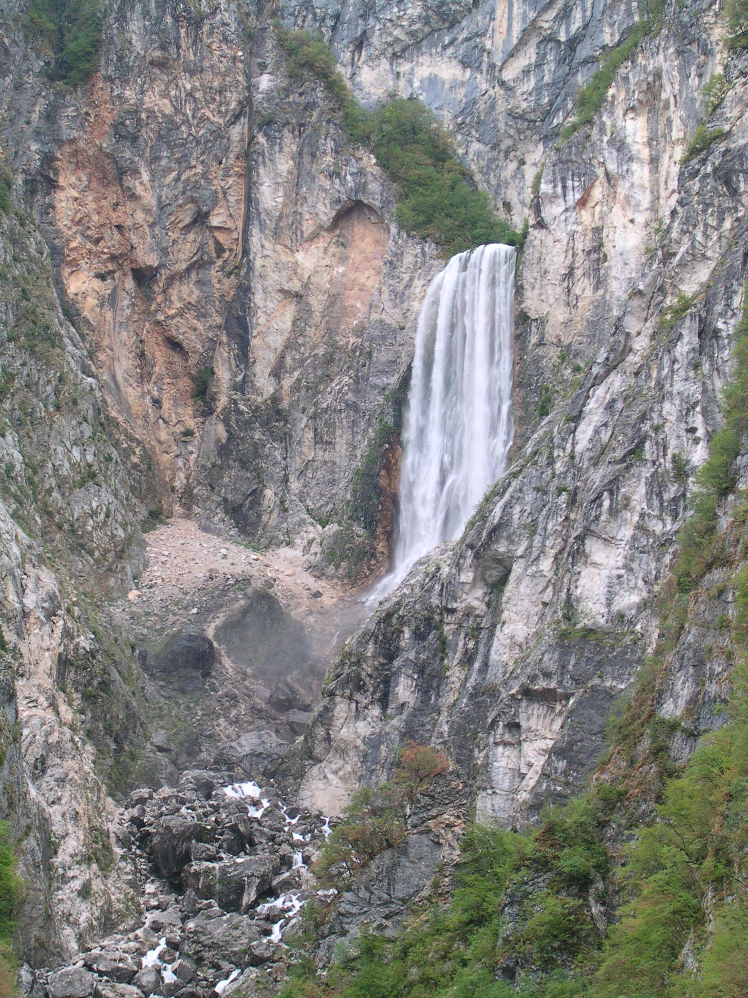 boka waterfall